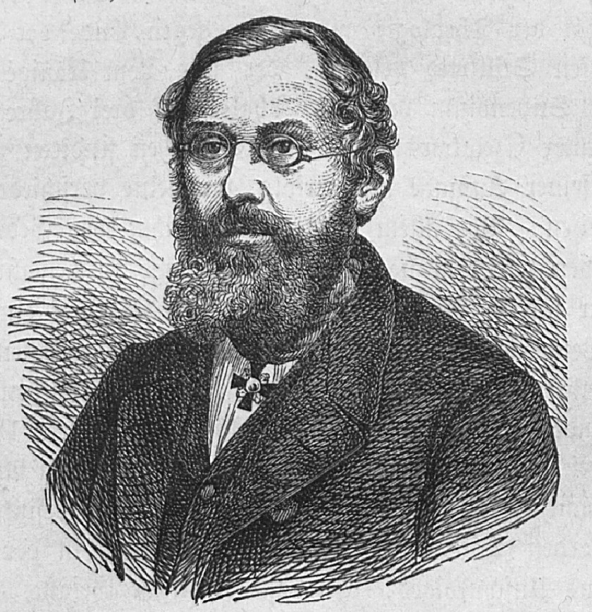 Hornjoserbsce: Jan Arnošt Smoler (1816–1884)